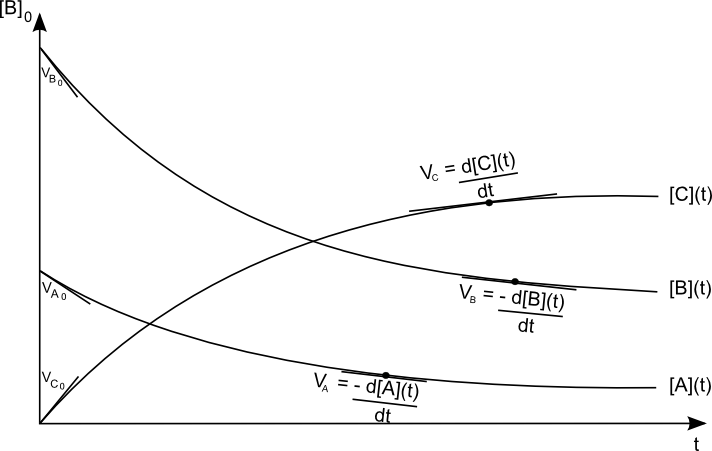 Grafico delle velocità di reazione o delle variazioni delle concentrazioni nel tempo.